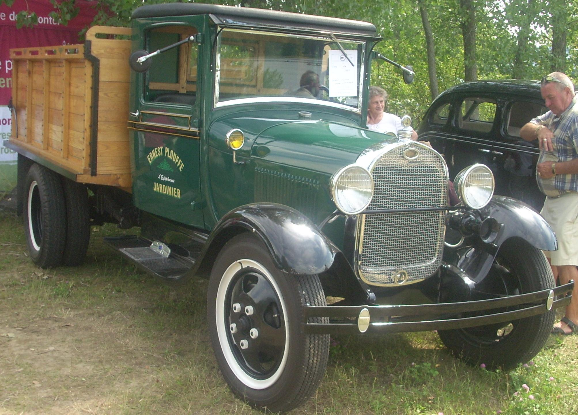 1929 Ford Model AA photographed in Laval, Quebec, Canada at Auto classique Laval 2010.